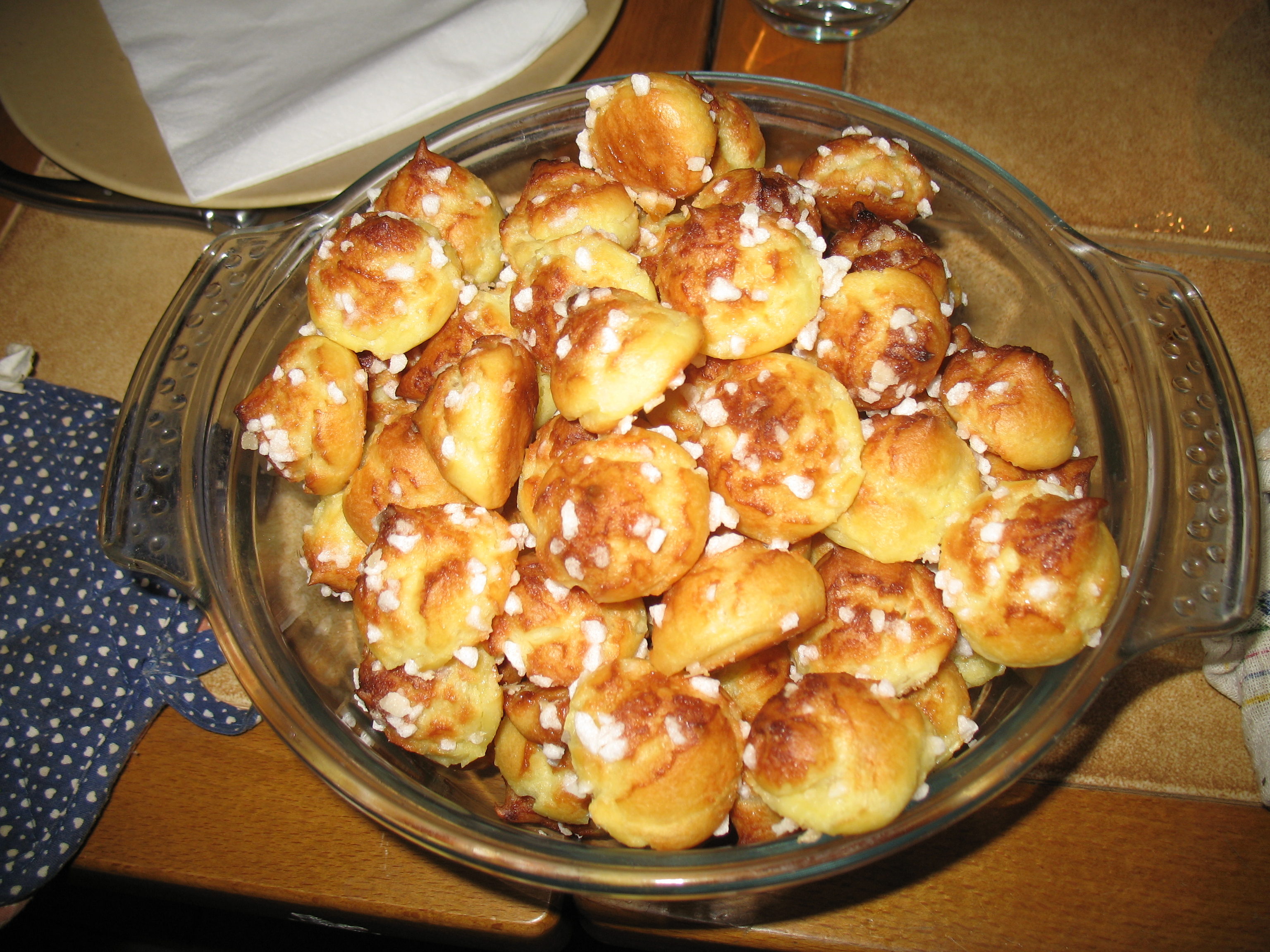 Chouquettes faites maison.